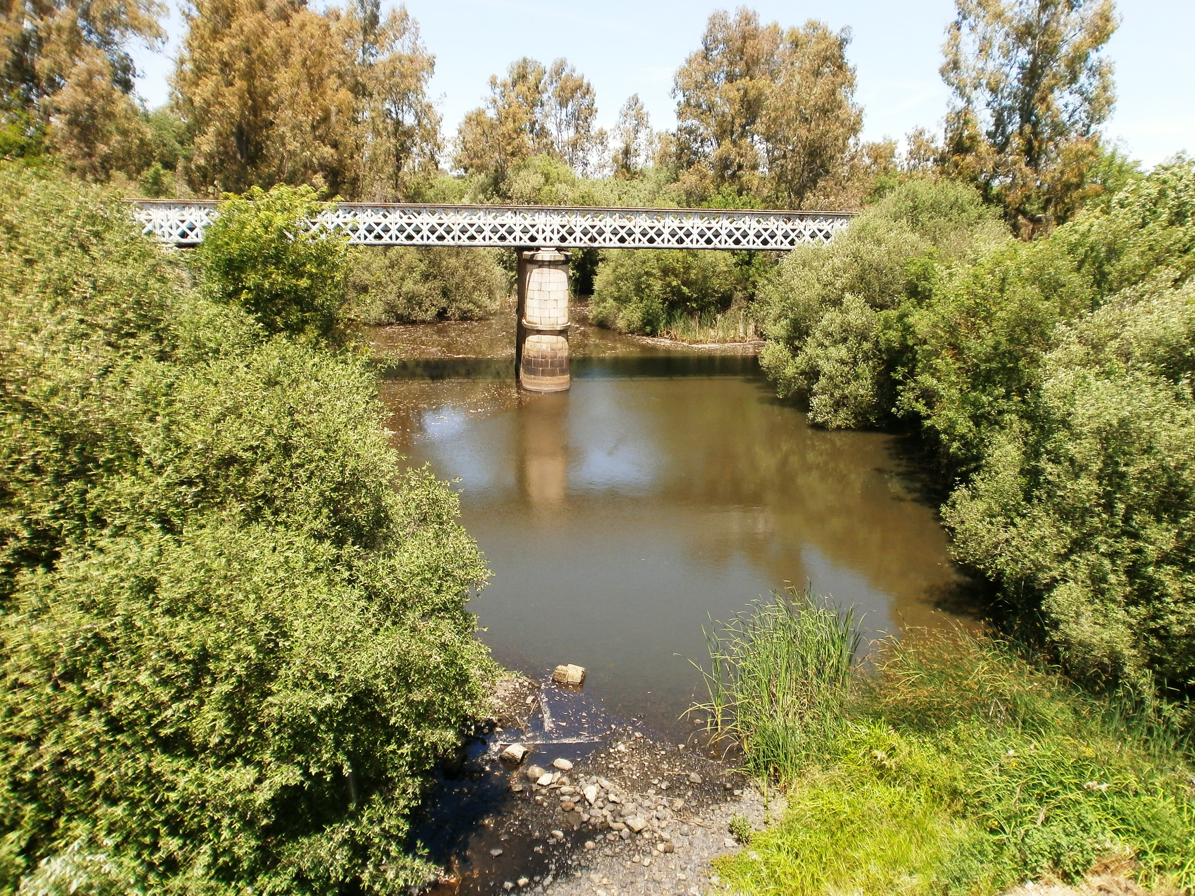 Río Gevora Bajo, afluente del Guadiana por la derecha, muy poco antes de su desembocadura. This is a photography of a Special Area of Conservation in Spain with the ID: ES4310059. Natura2000 entry, EEA entry